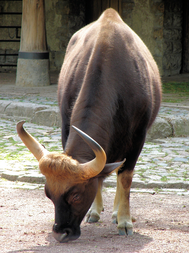 Tier im Zoologischen Garten Berlin